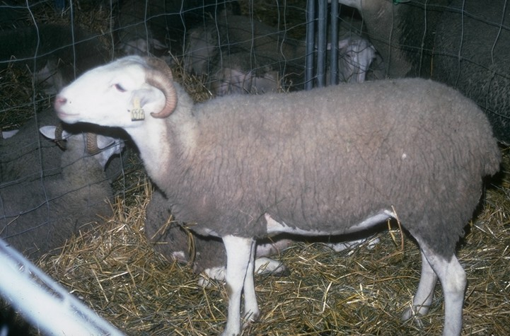 Tarasconnais